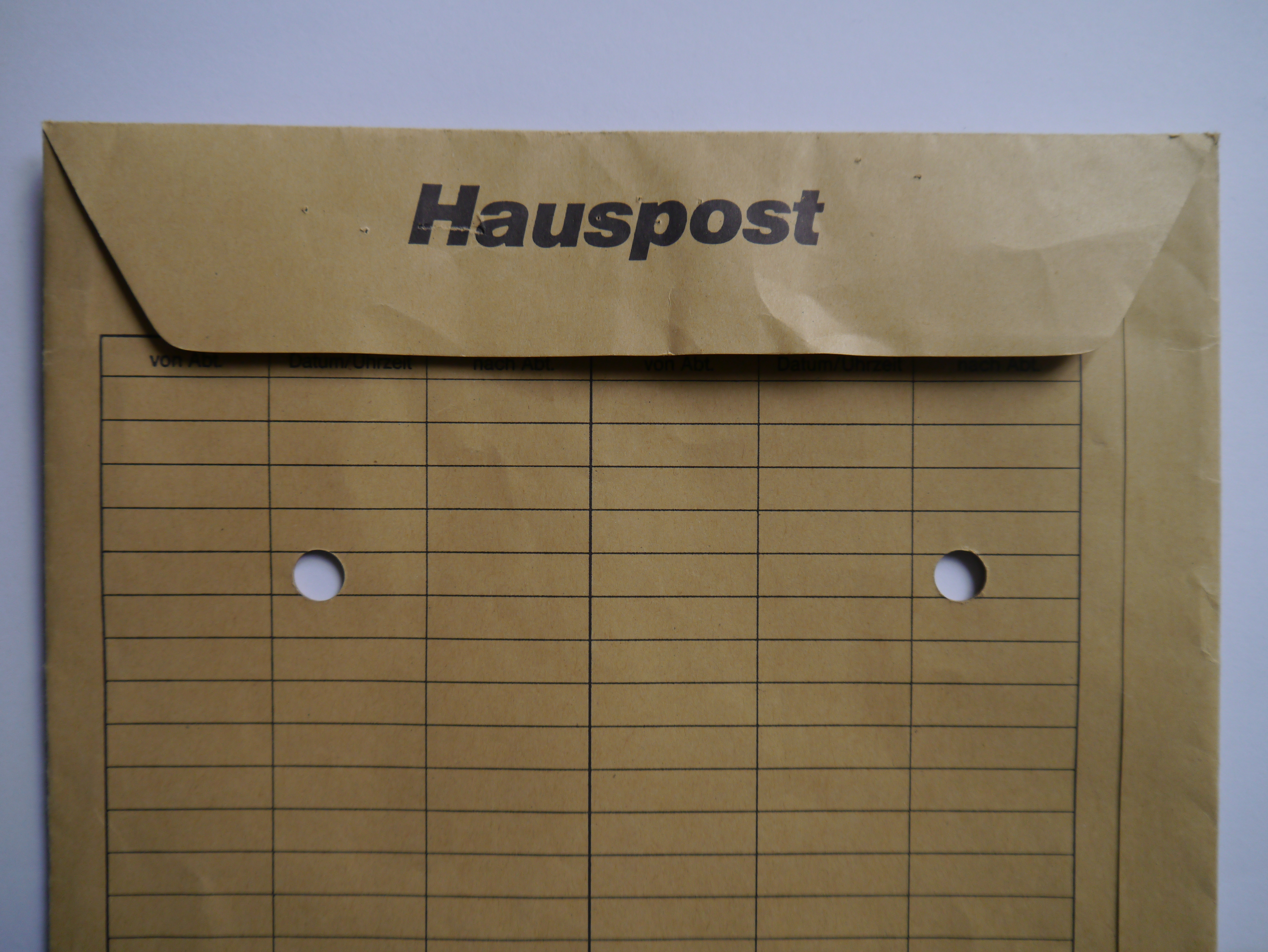 Hauspostumschlag Hinten 2012